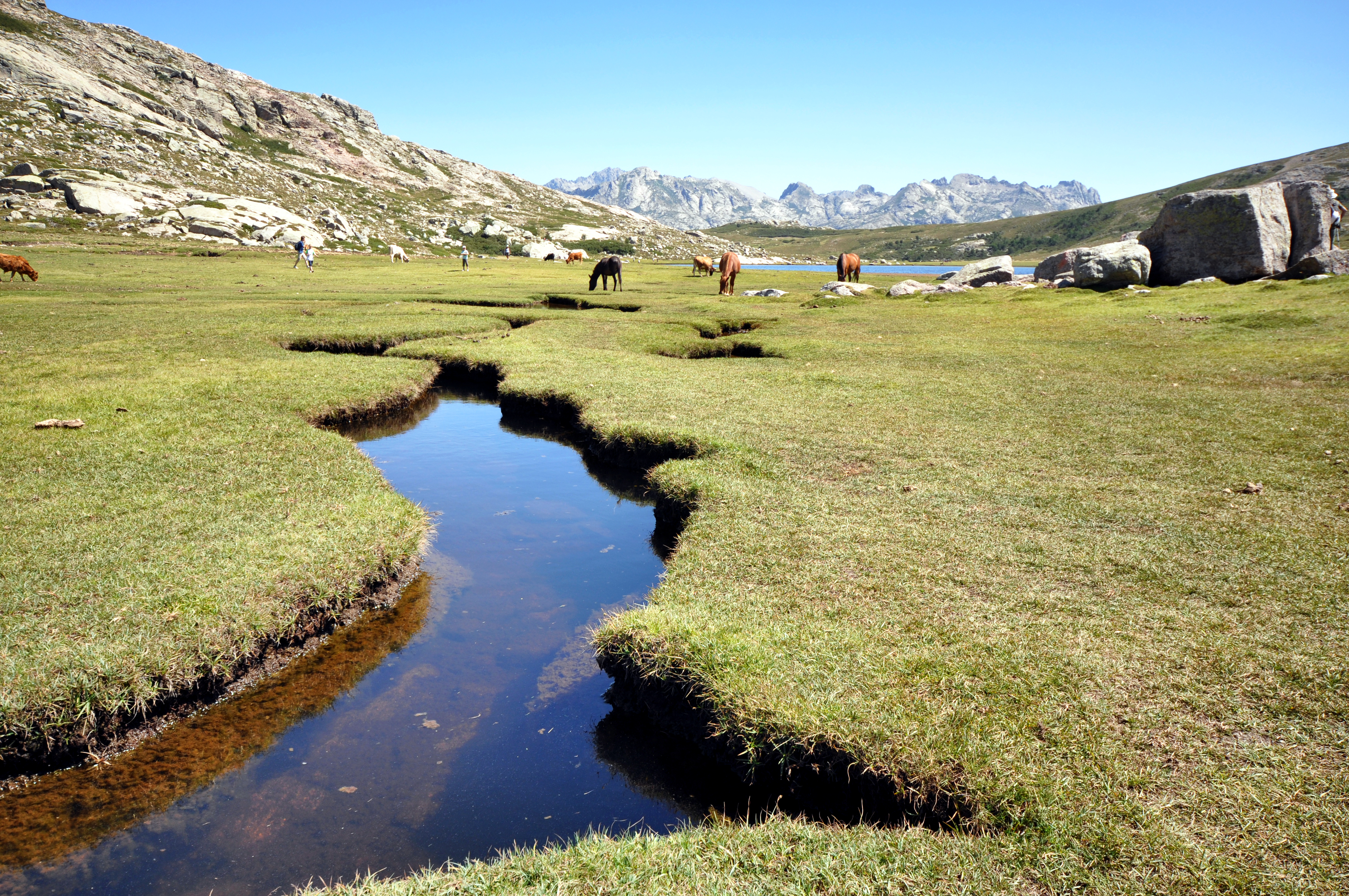 Corte, Centre Corse - Le lac de Nino et les pozzines